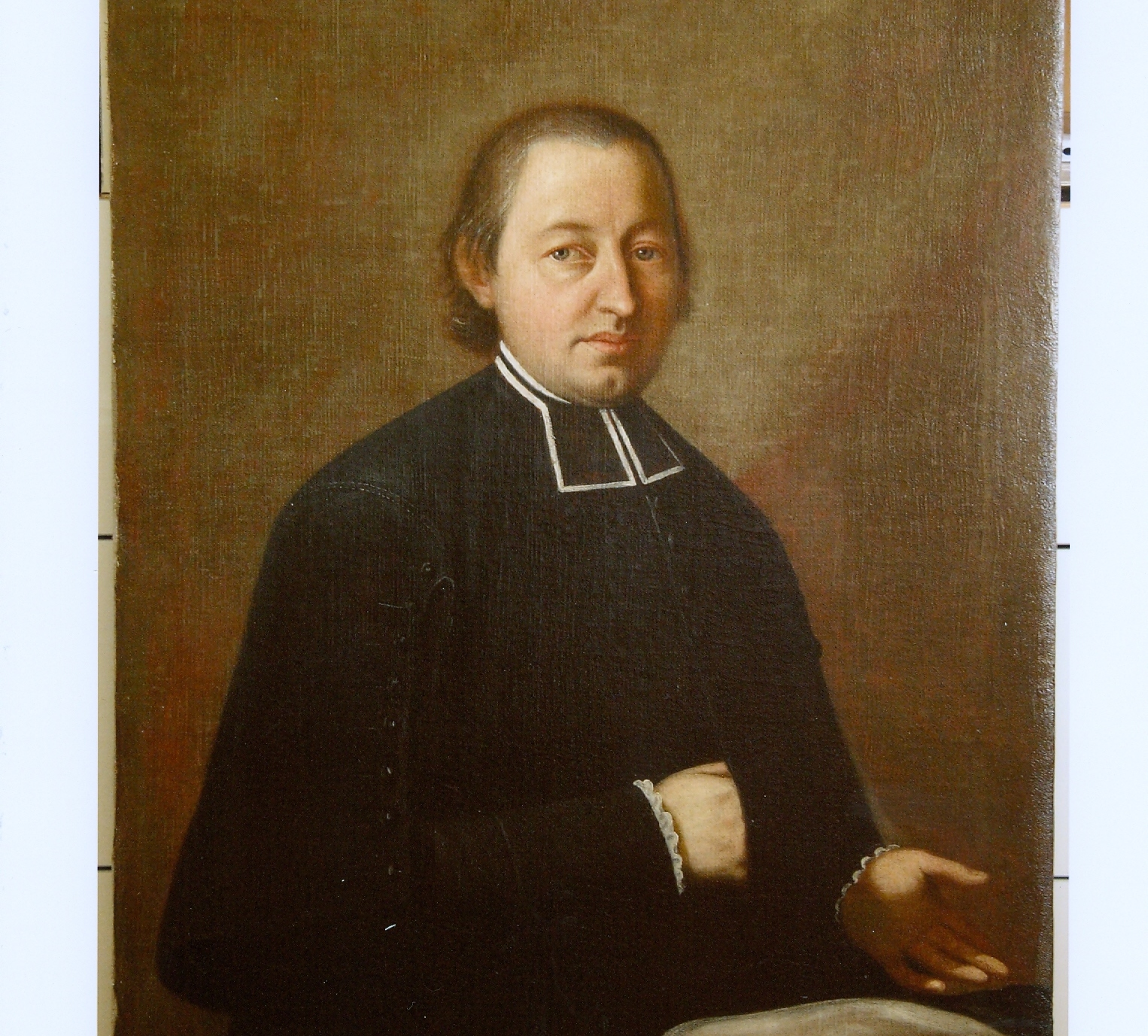 patrně portrét jehož autorem je Josef Kramolín - portrét Ch.Stöhra (konec 18.stol)